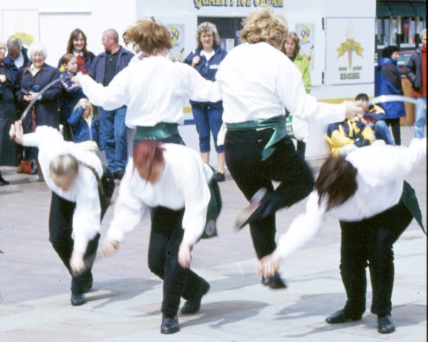 Pengwyn Rapper Schwerttänzerinnen / Beschreibung: Pengwyn Rapper, ein weiblicher Schwerttanzverein aus Newcastle upon Tyne, beim Aufführen des Rapper-Kettenschwerttanzes (siehe Rapper Sword) beim World Millennium Sword Spectacular in Mai 2000.